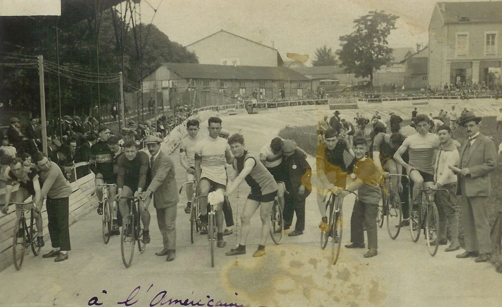 Course à l'américaine, piste de la Haubette à Reims vers 1927